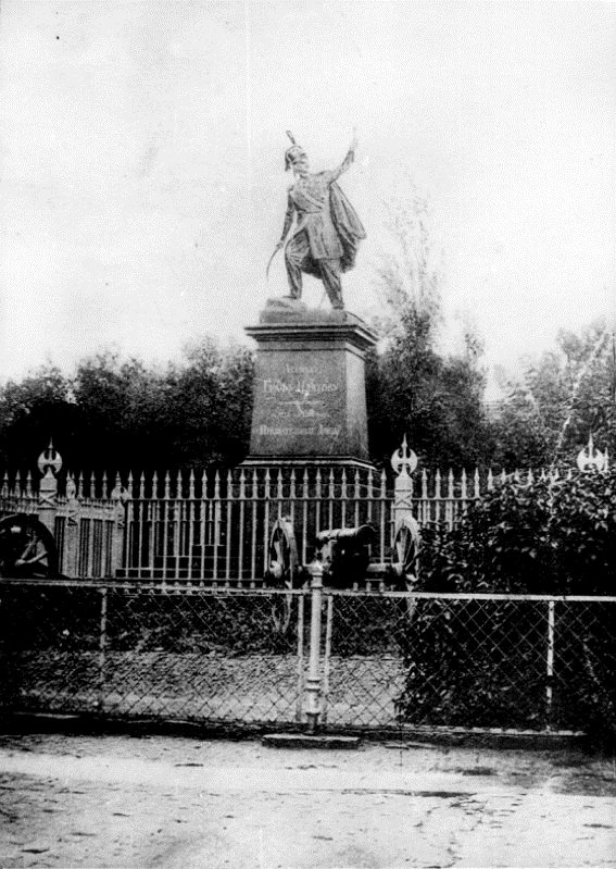 Памятник атаману М. И. Платову в Новочеркасске